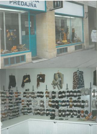 Prvá predajňa Bepon na Gorkého ulici